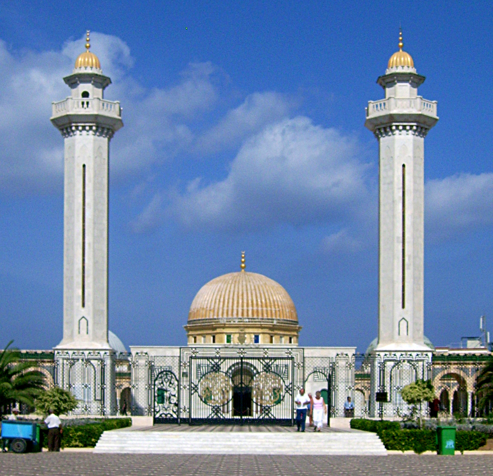 Mausolée Bourguiba à Monastir